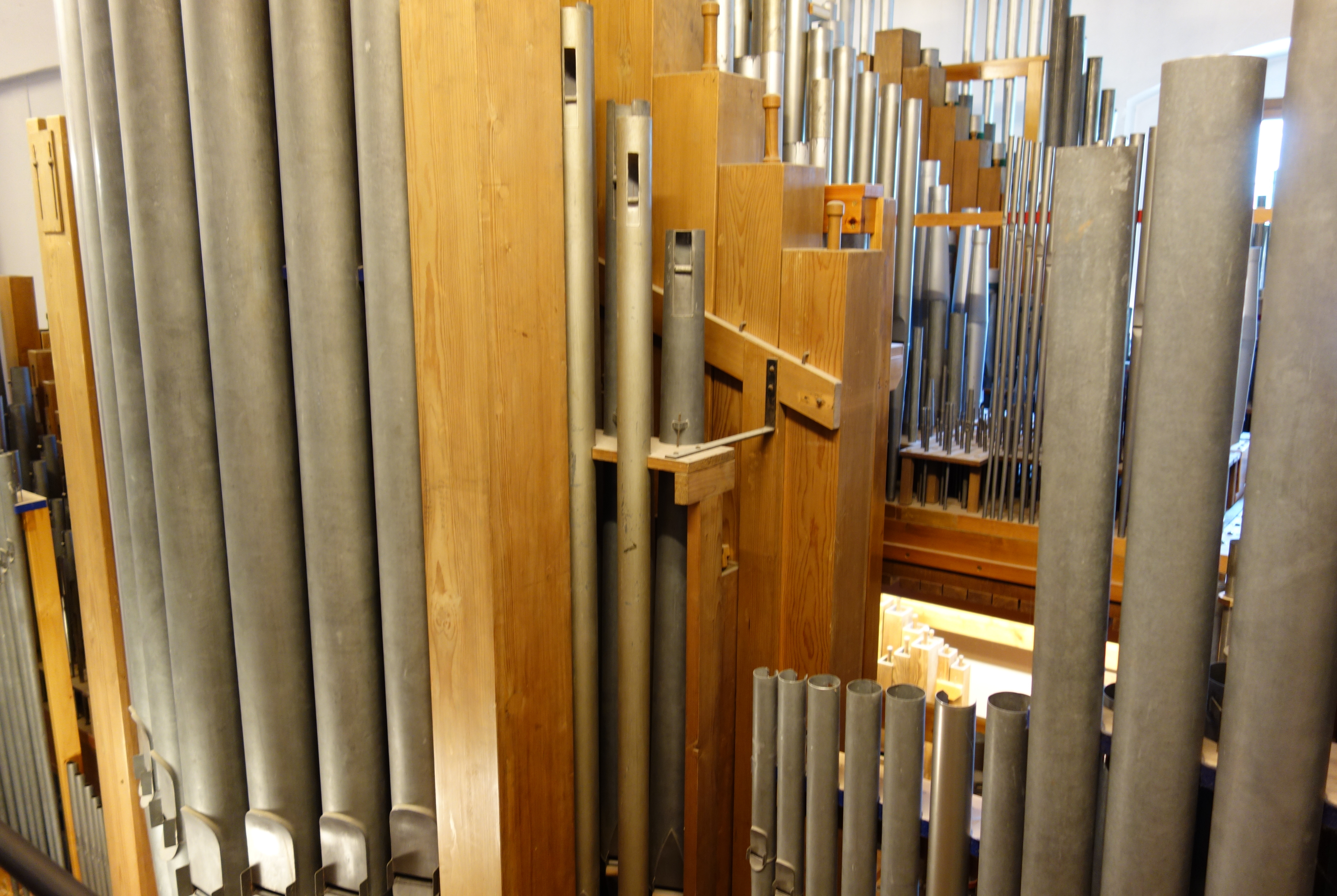 Blick in die Moser-Orgel aus Gößweinstein im Orgelzentrum Valley